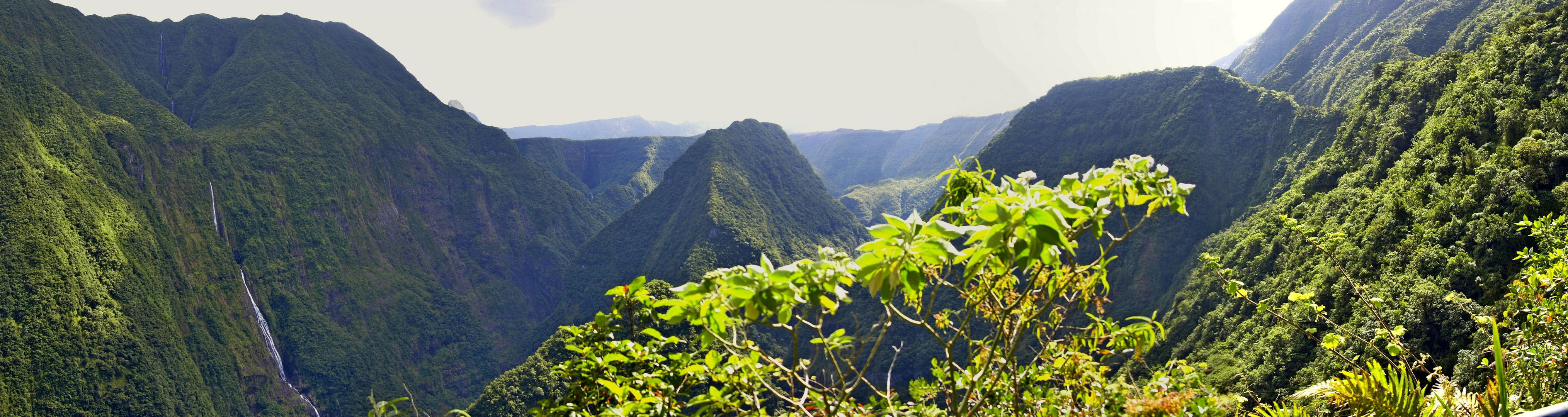 Panorama Takamaka